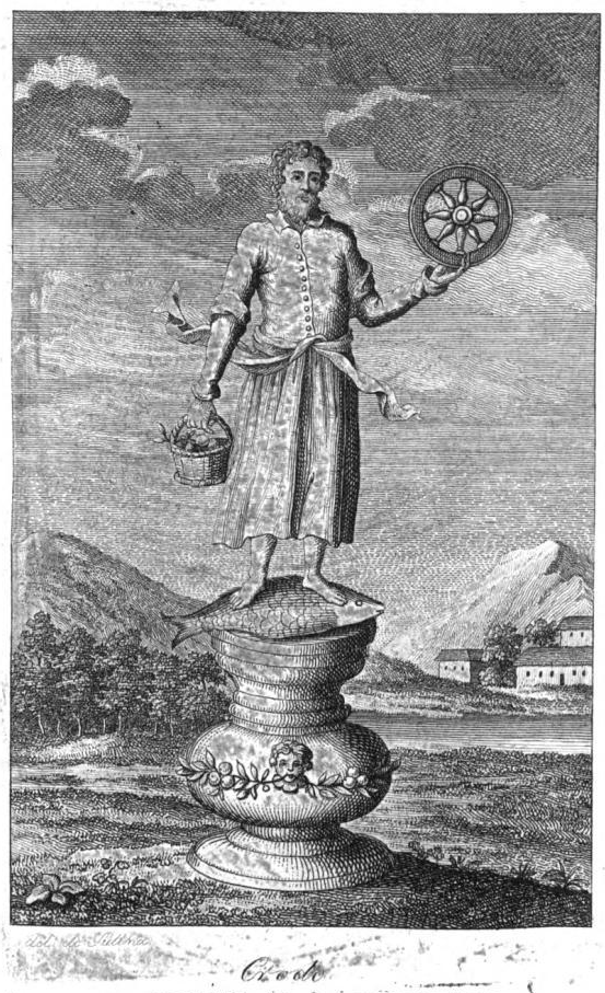 Кродо, илл. к книге Мифология славянская и российская А.С. Кайсарова.